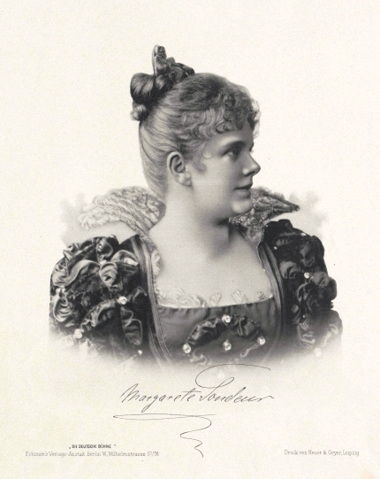 Margarete Tondeur (* 1865)